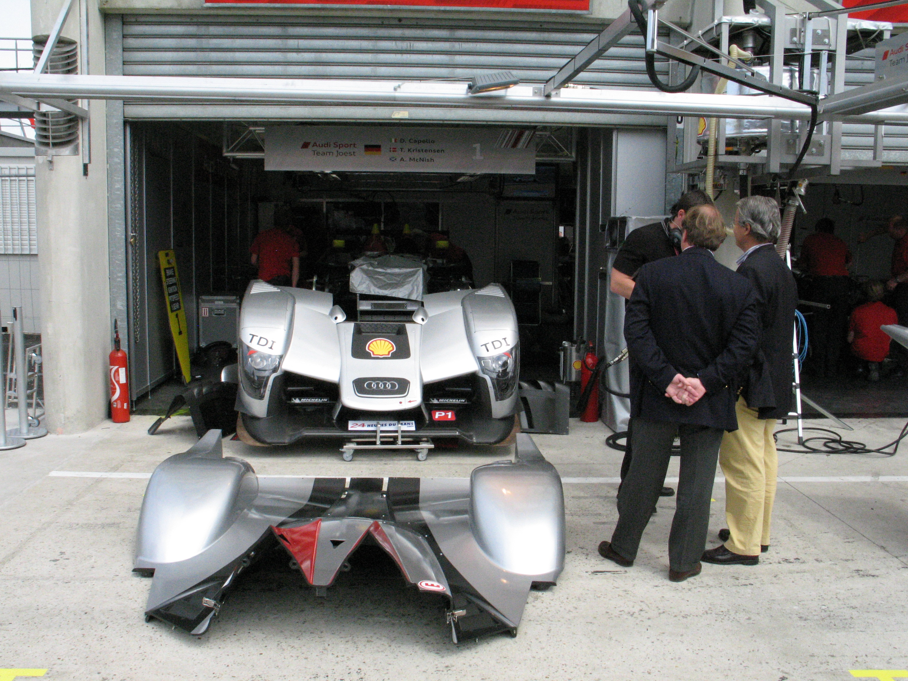 Audi R15 aux 24 heures du Mans 2009